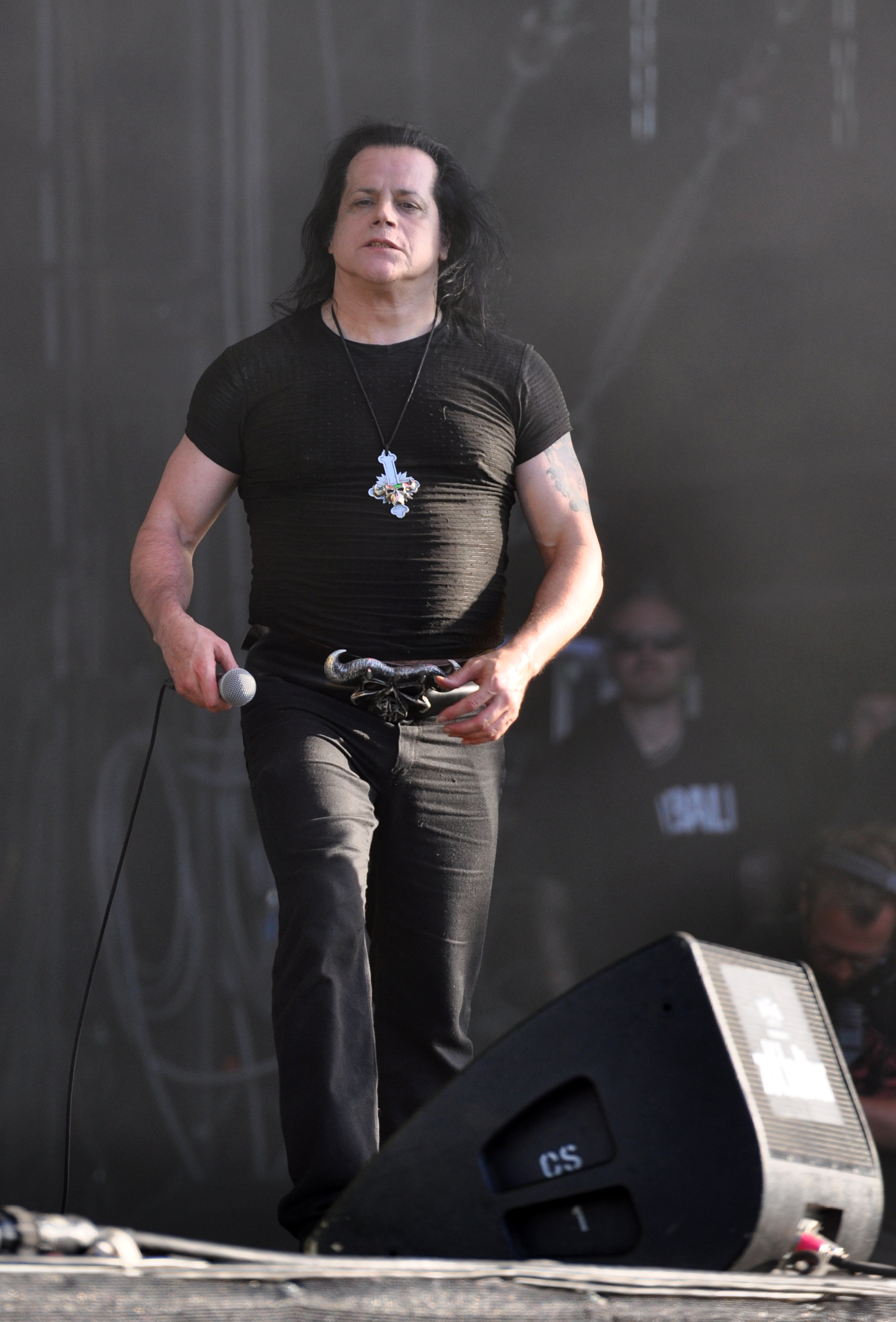 Danzig at Wacken Open Air 2013